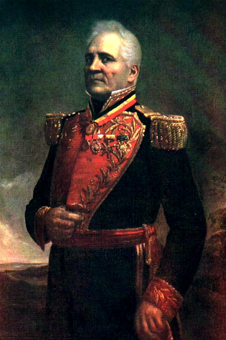 Retrato del General en Jefe venezolano José Laurencio Silva Flores, realizado en óleo sobre lienzo, por el pintor Martin Tovar y Tovar en 1878. Colección de la Galería de Arte Nacional. Caracas - Venezuela.